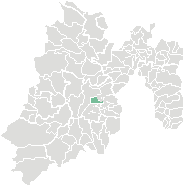 locatie van de gemeente Ixtapaluca in Mexico (staat)